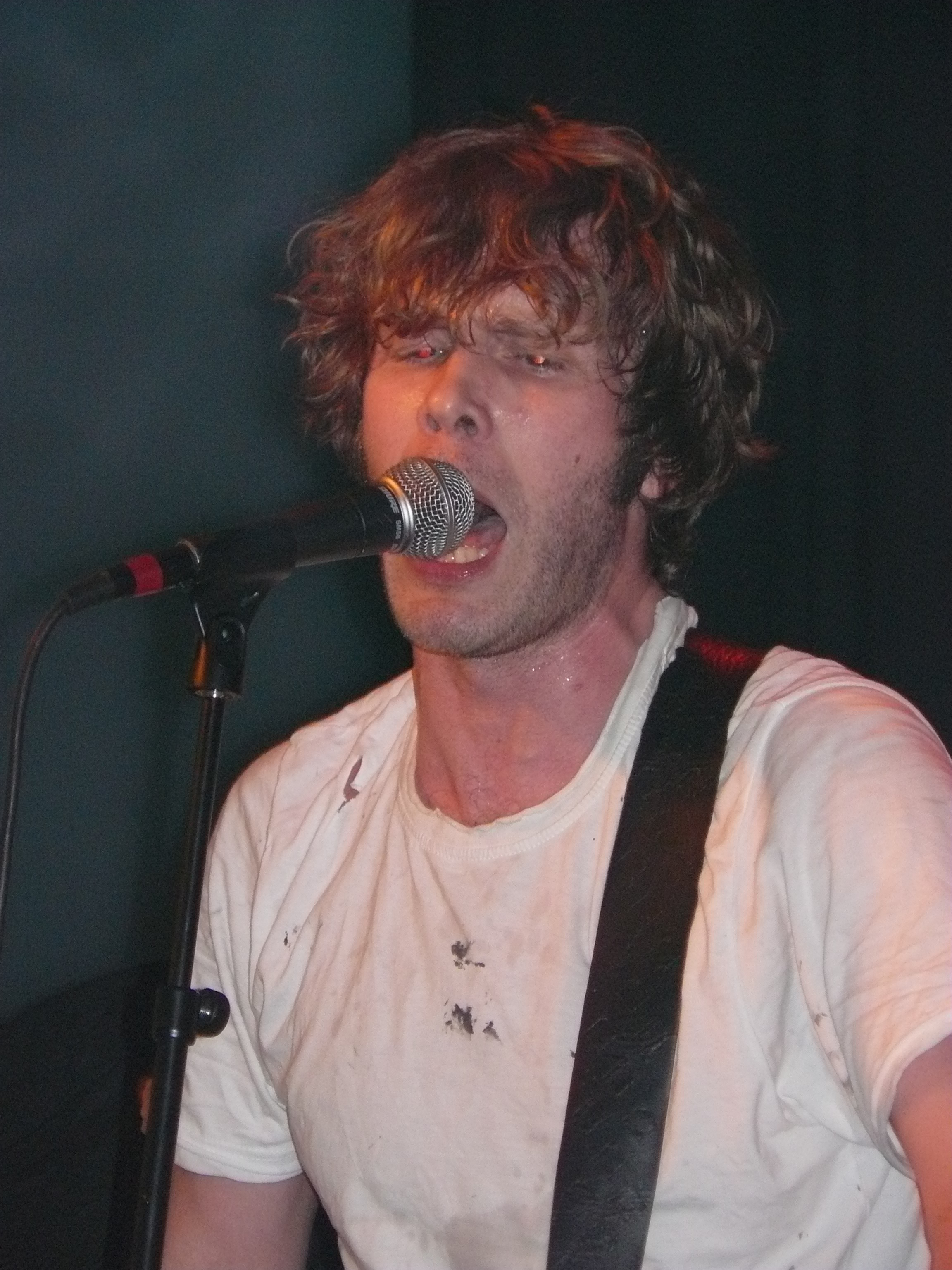 Jonass van QYD